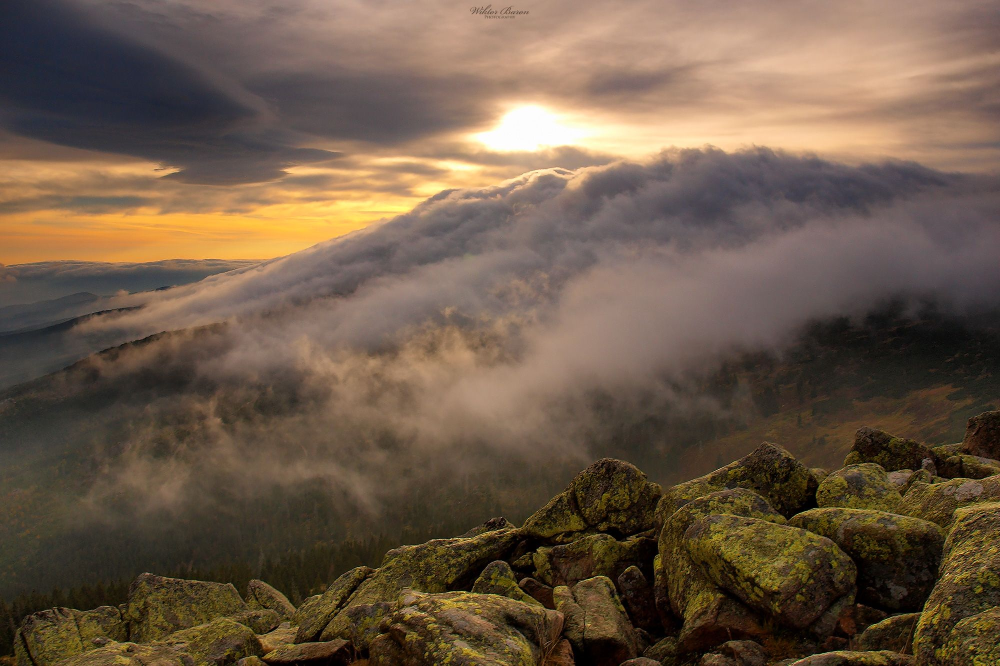 Park narodowy: Karkonoski Park Narodowy This is a photography of protected area with CRFOP ID PL.ZIPOP.1393.PN.11